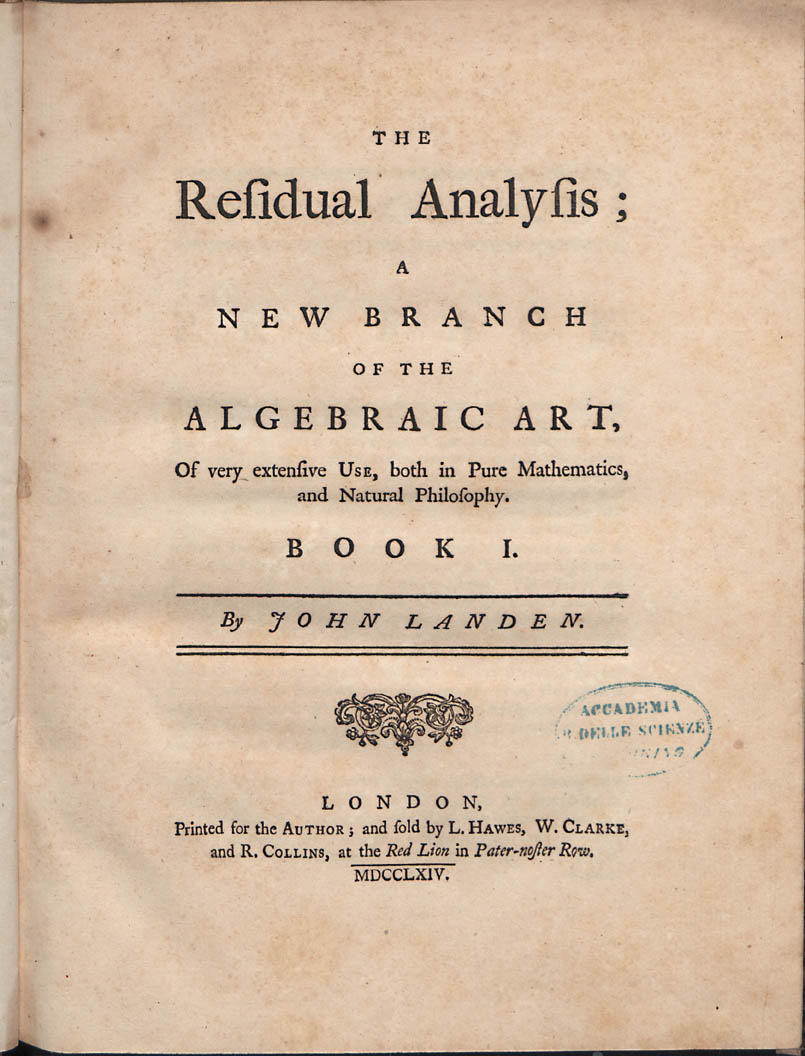 Frontespizio